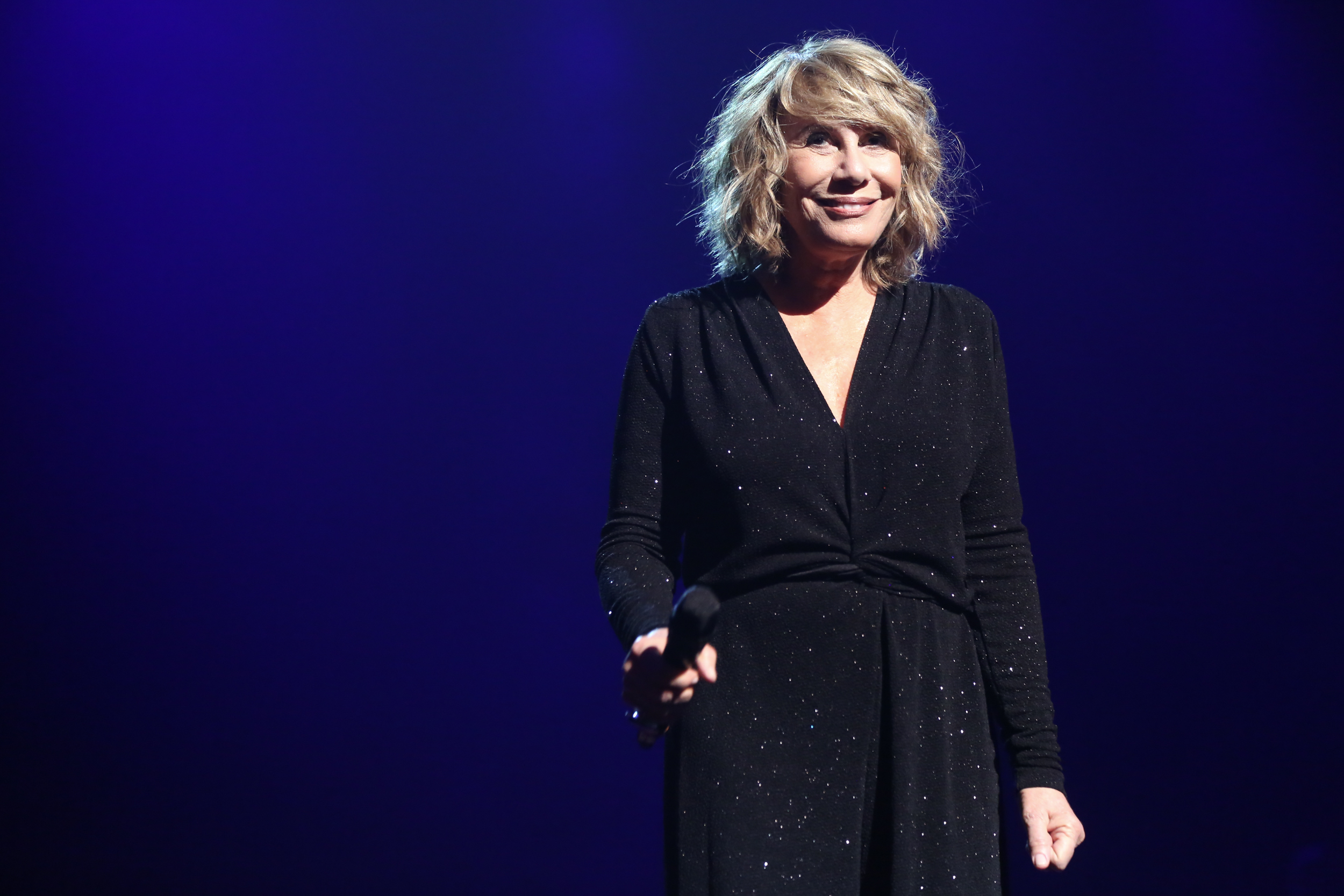 Renata Sorrah - 26° Prêmio da Música Brasileira 2015, no Theatro Municipal, no Centro do Rio de Janeiro/RJ. (10/06/15) Foto: Roberto Filho/Divulgacão